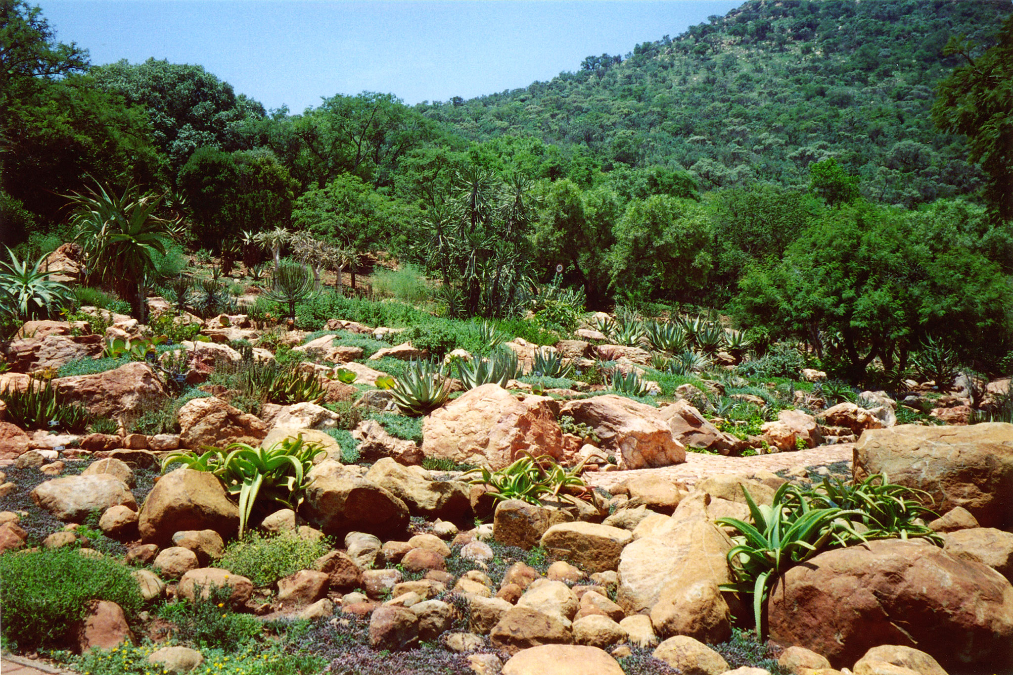 West Johannesburg